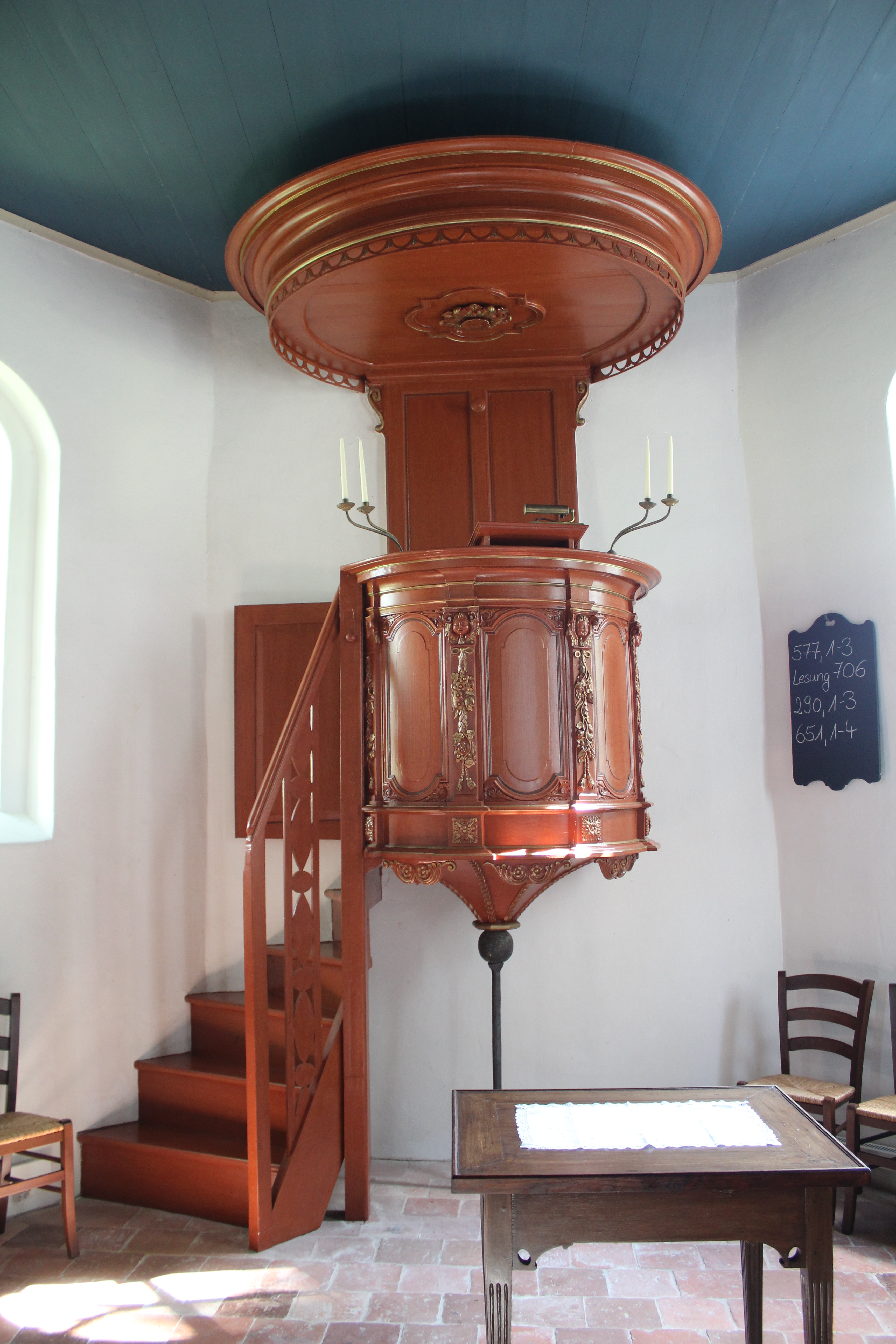 Ev.-reformierte Kirche Böhmerwold, Gemeinde Jemgum, Landkreis Leer, Ostfriesland, Deutschland